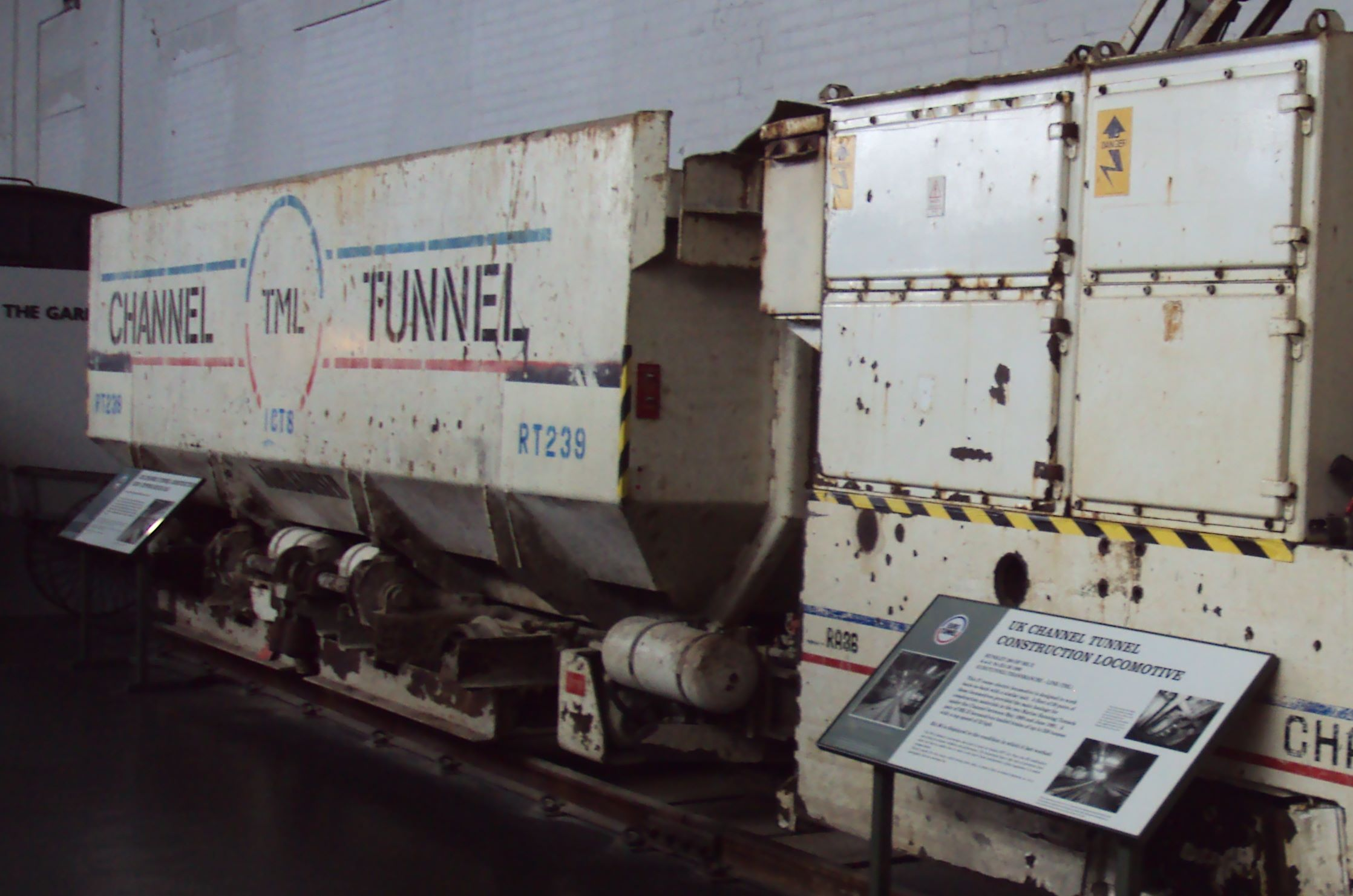 Beim Bau des Ärmelkanaltunnels eingesetzte Kipplore im National Railway Museum, York